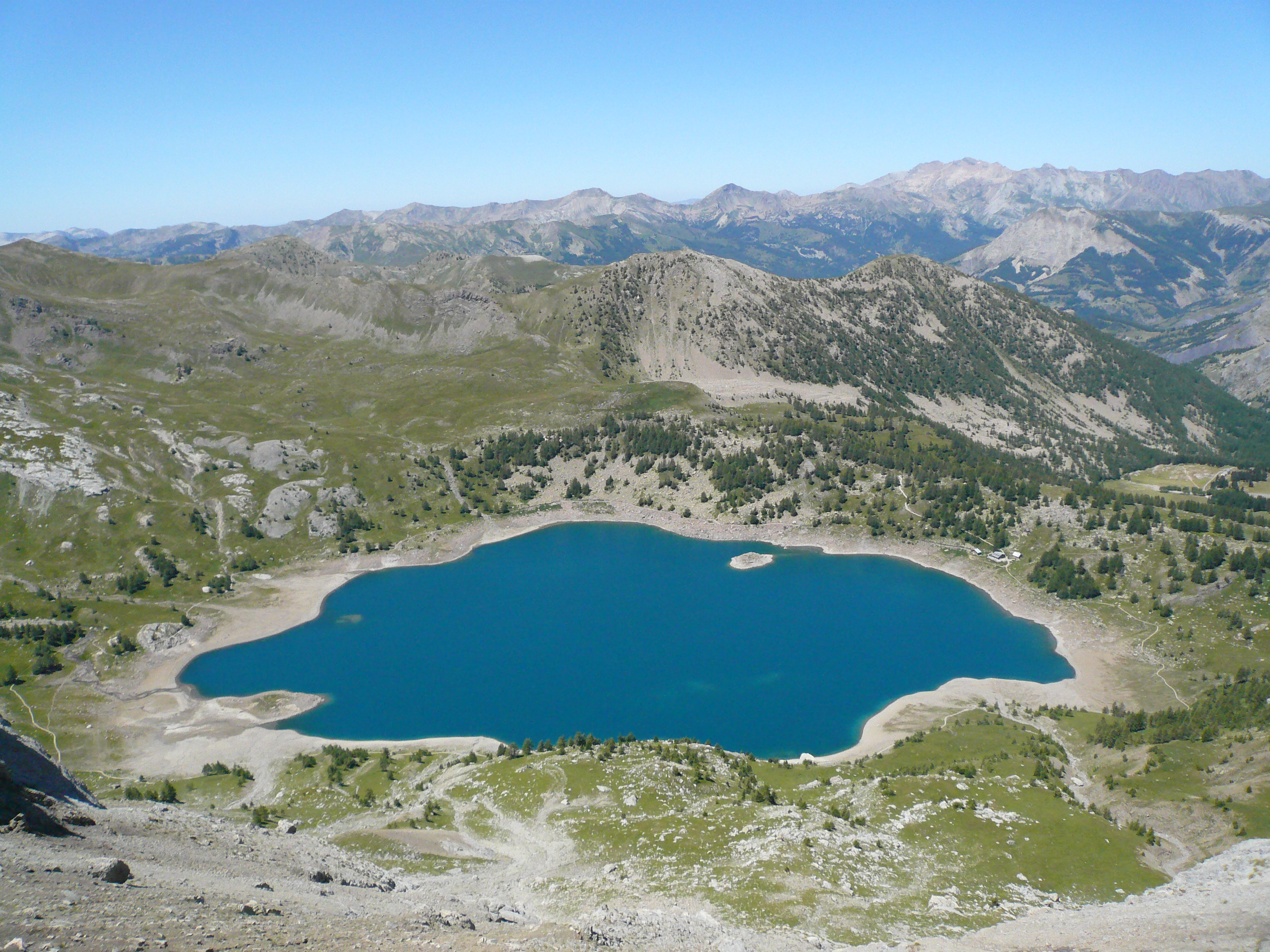 Lac d'Allos - July '07